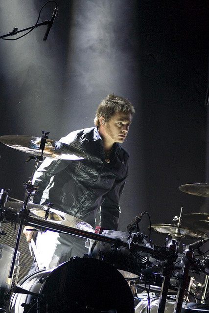 Evanescence @ Maquinaria Festival - 08/11/2009 - São Paulo, Brasil É proibida a cópia ou reprodução deste material sem a autorização do autor. Por favor, não publique nada daqui sem o devido crédito. Fotógrafo: Alexandre Cardoso